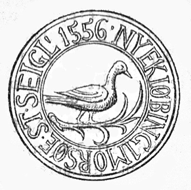 'Dansk: Stadssegl for Nykøbing Mors fra 1556.